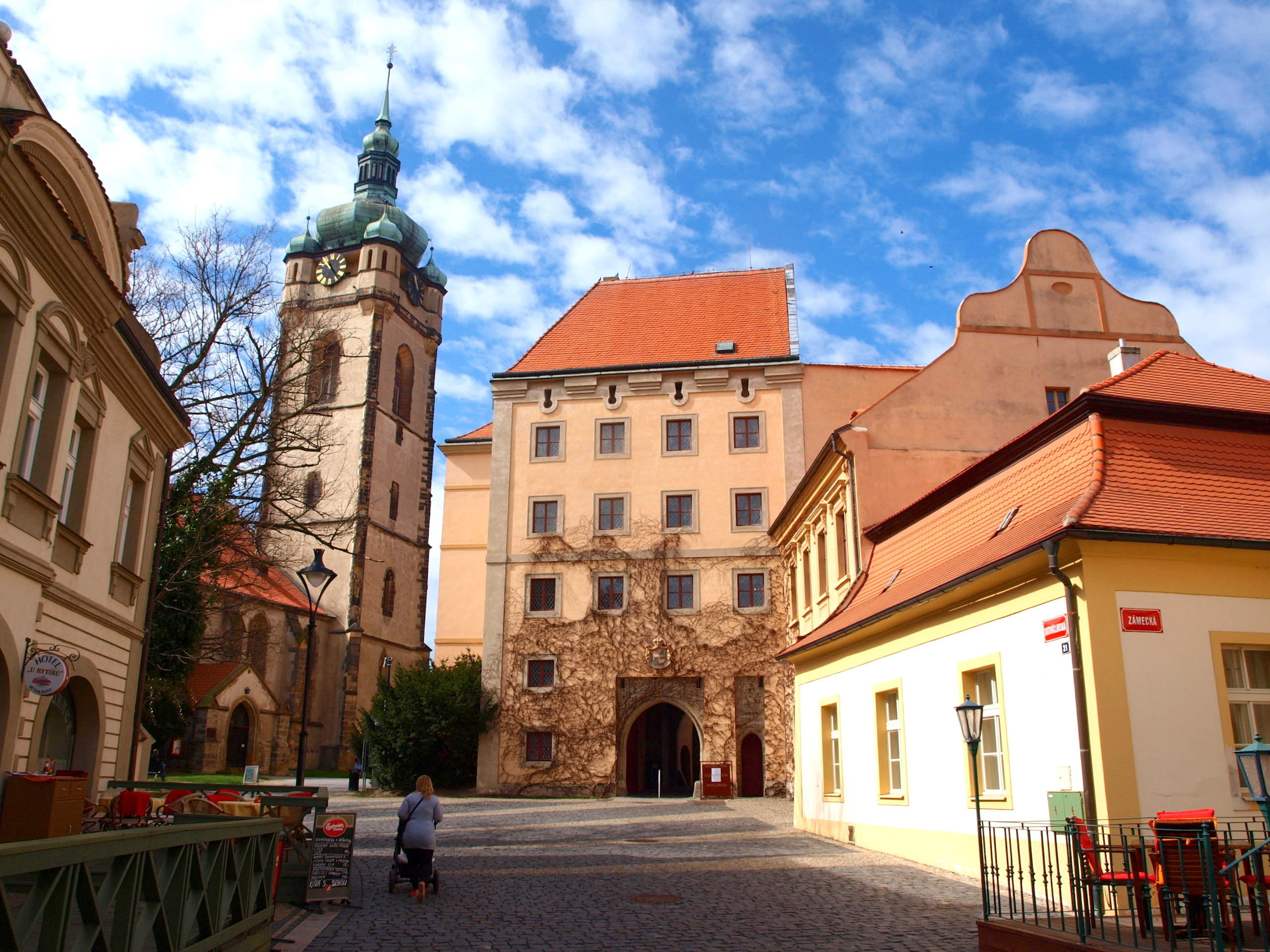 Mělník - zámek